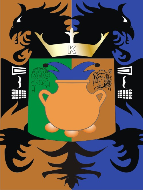 Escudo_atotonilco_el_alto_jal